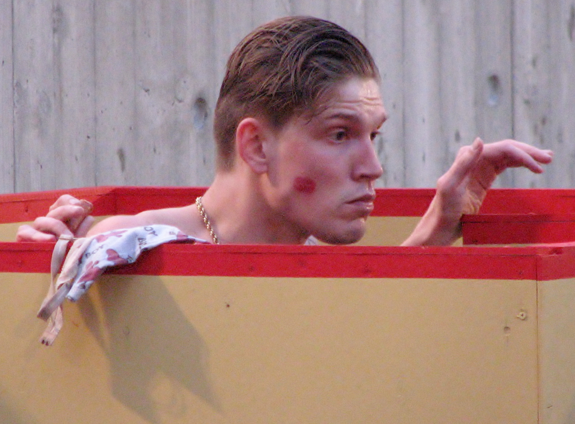 Henrik Kalmet Linnateatri hooaja avamisel